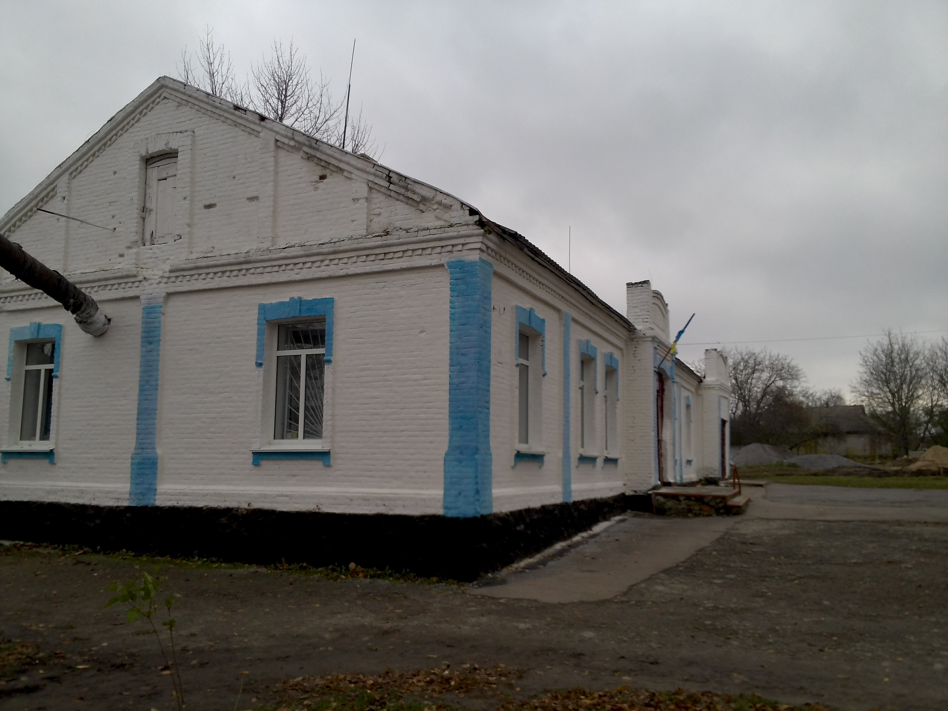 Школа у с. Нова Прилука. Раніше тут знаходився хедер